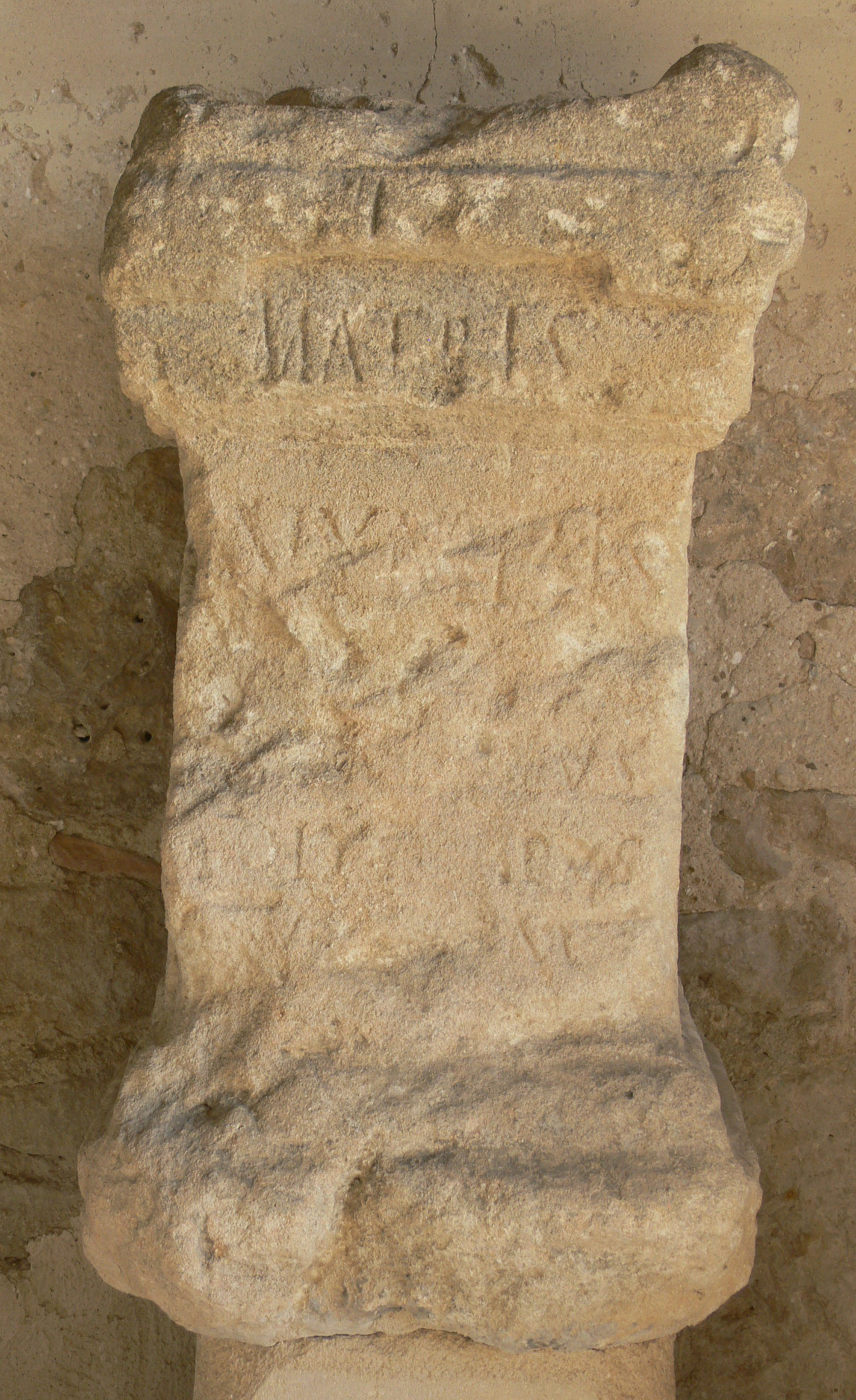 Prieuré du Val des Nymphes : inscription latine d'époque romaine retrouvée au Val des Nymphes en réemploi dans un mur de la ferme Geneston, conservée dans l'église de La Garde-Adhémar. Autel votif dédié aux Mères et aux Nymphes. Texte latin : "Matris / Nymphis / [...]o[...]o/ernus / Poly[ca]rpus / u(otum) s(oluit) [l(ibens)] m(erito)." Référence : Carte archéologique de la Gaule XI : la Drôme, 1957, p.50, n° 38 ; A. Blanc, "Nouveaux bas-reliefs des déesses-mères et du dieu au maillet chez les Tricastins", Gallia, 1967, 25-1, p. 71, n. 14[1] - CAG 26, pp. 367-368)